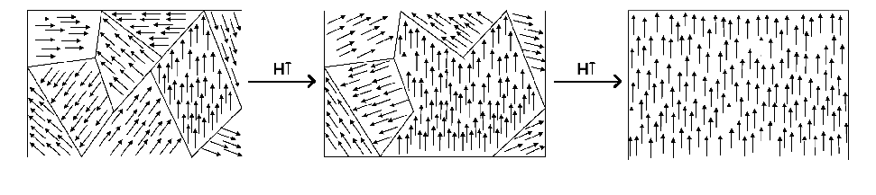 Esquema de dominios magnéticos de un ferromagneto alineándose con un campo creciente. Preparada por Jose Lloret y Alicia Forment, y liberada bajo la GFDL. Categoría:Esquemas (imagen)